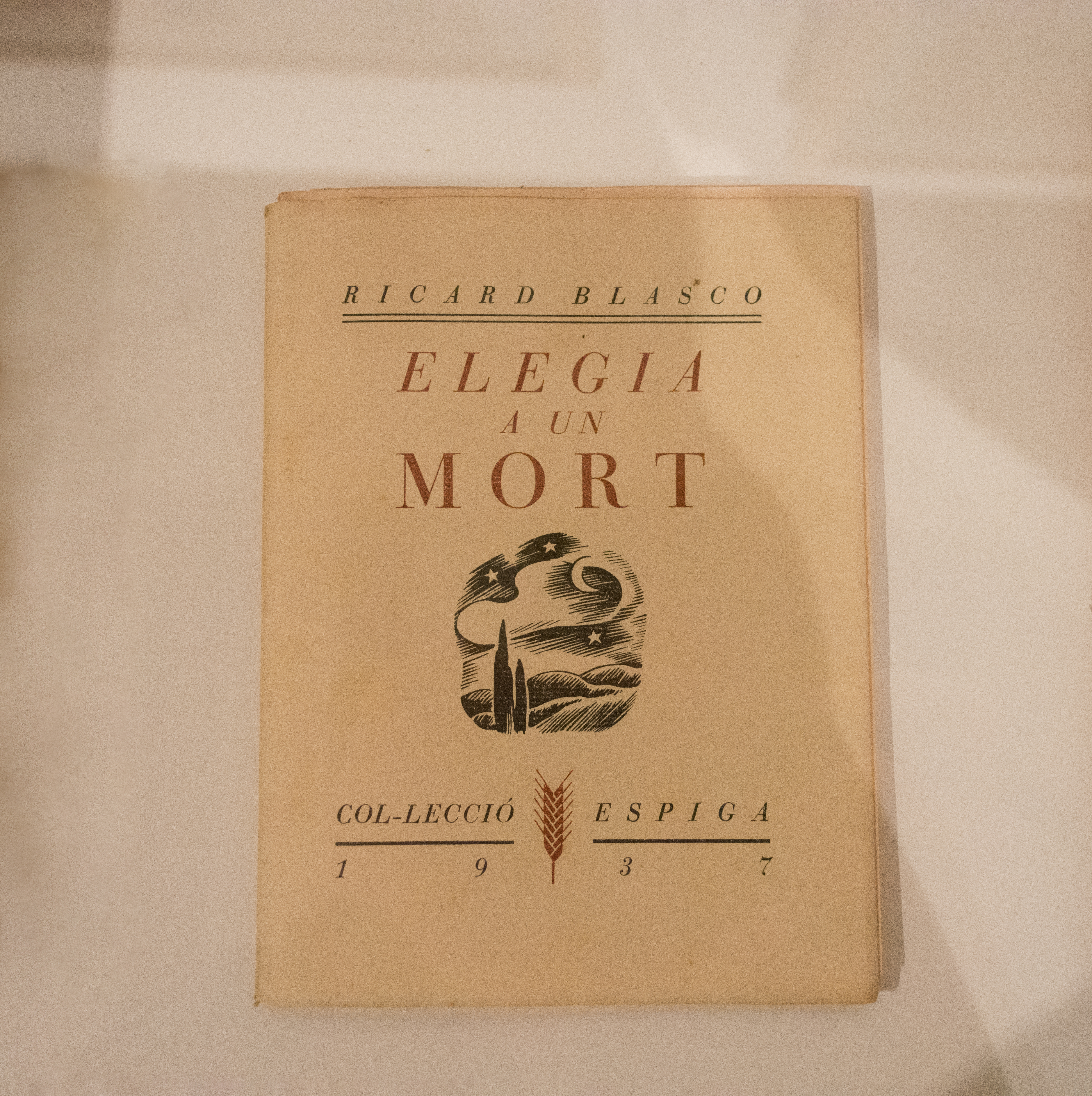 Ejemplar de Elegia a un mort, libro de Ricardo Blasco Laguna. Exposición Por la defensa de la Cultura en el Centro del Carmen de Valencia.